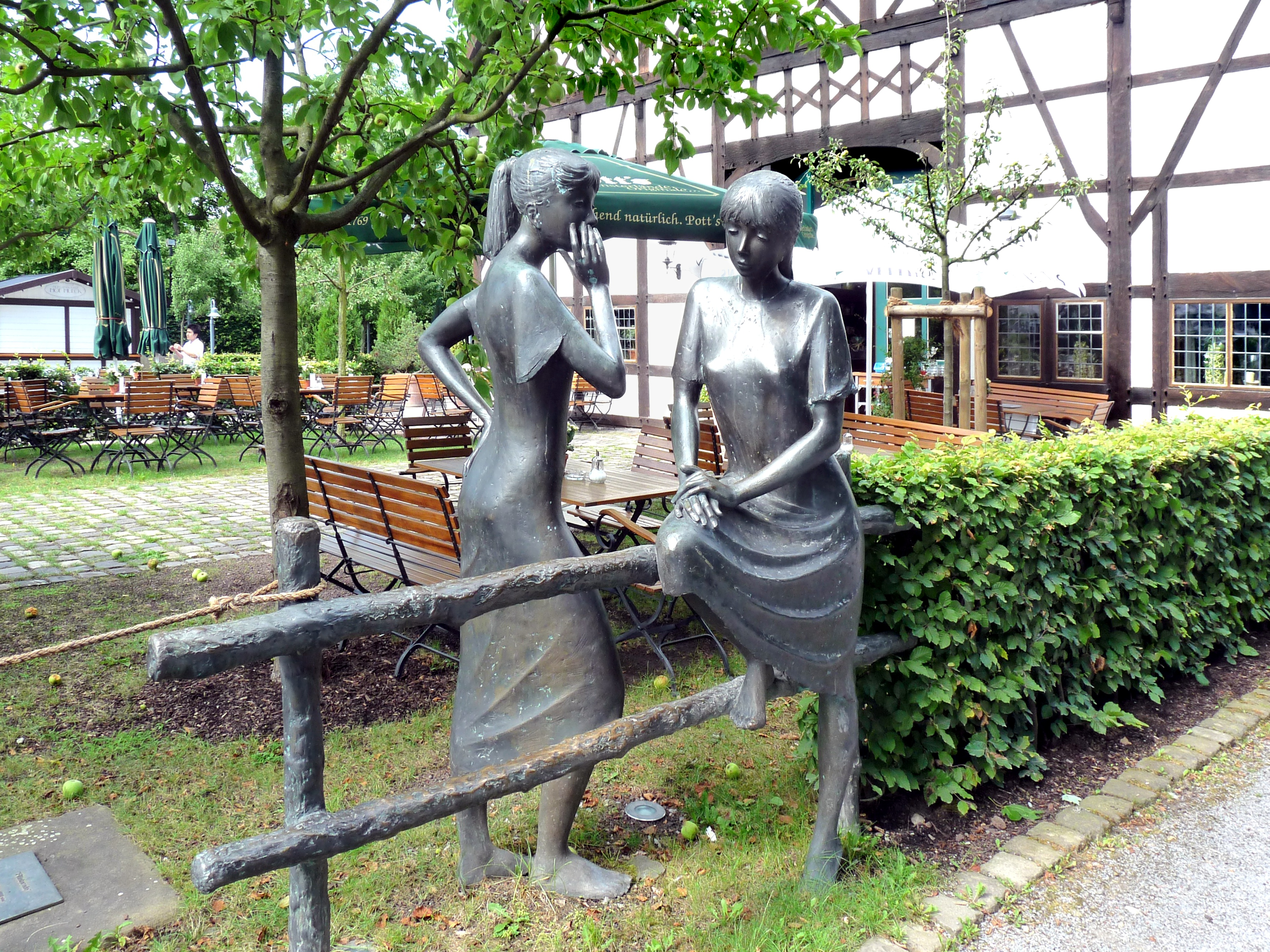 Die Flüsternden